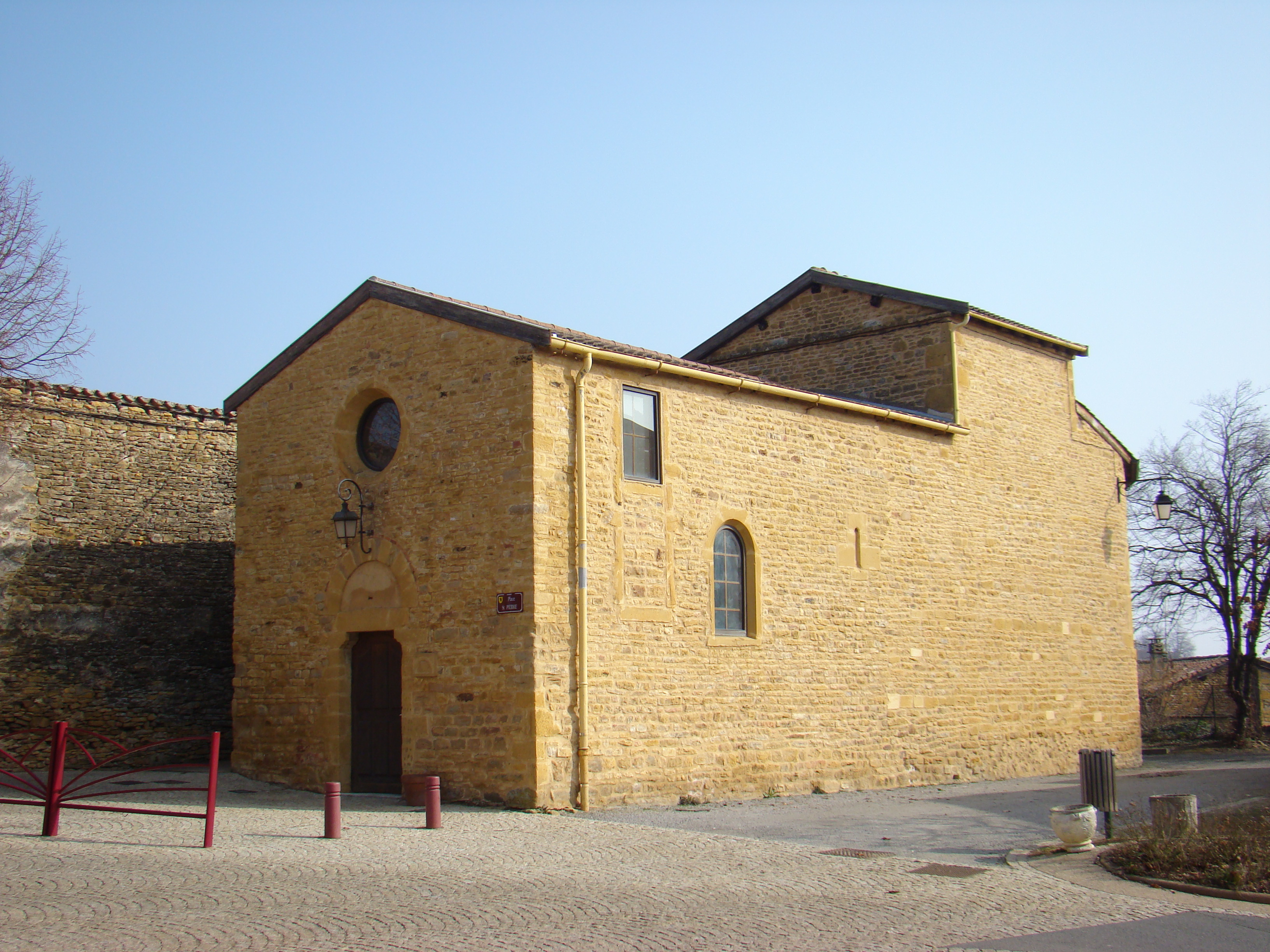 La chapelle Saint Pierre de Moiré